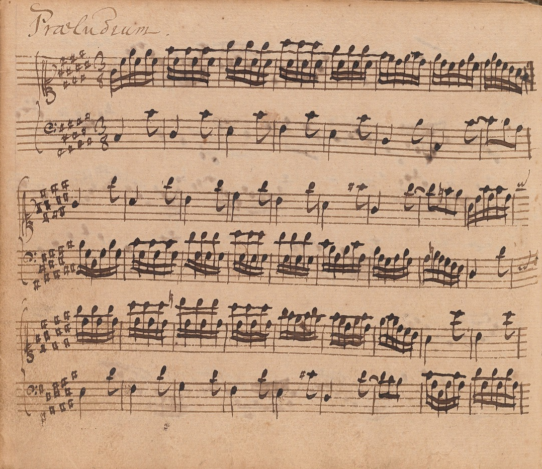 Incipit du prélude en ut-dièse majeur (BWV 848) dans la version primitive du Clavierbüchlein pour Wilhelm Friedemann Bach (1720).